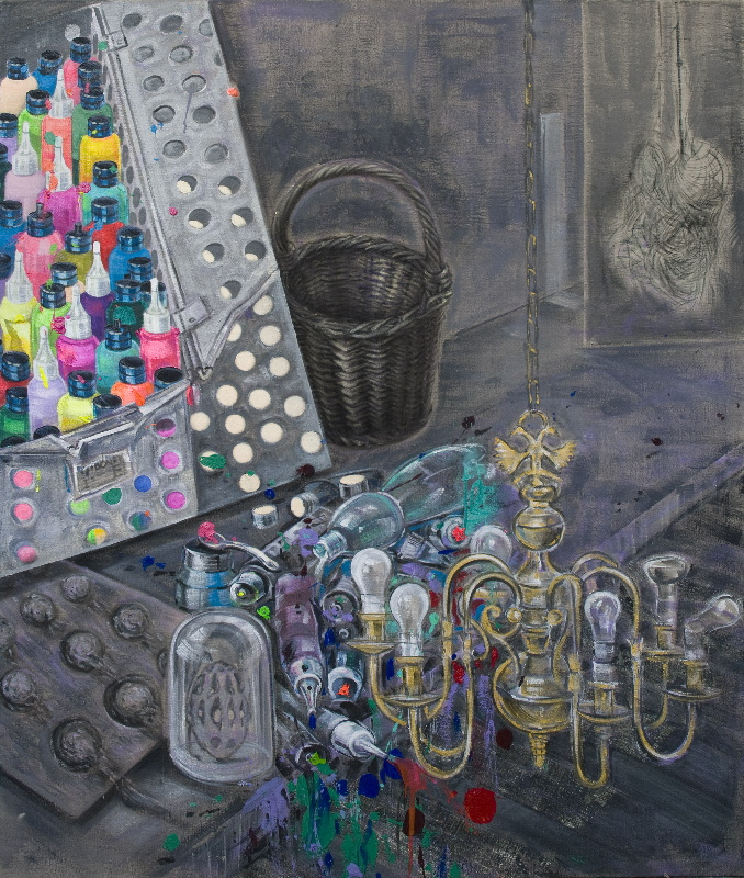 Malba od Xénie Hoffmeisterové. Akryl na plátně, 180 x 130 cm, 2010